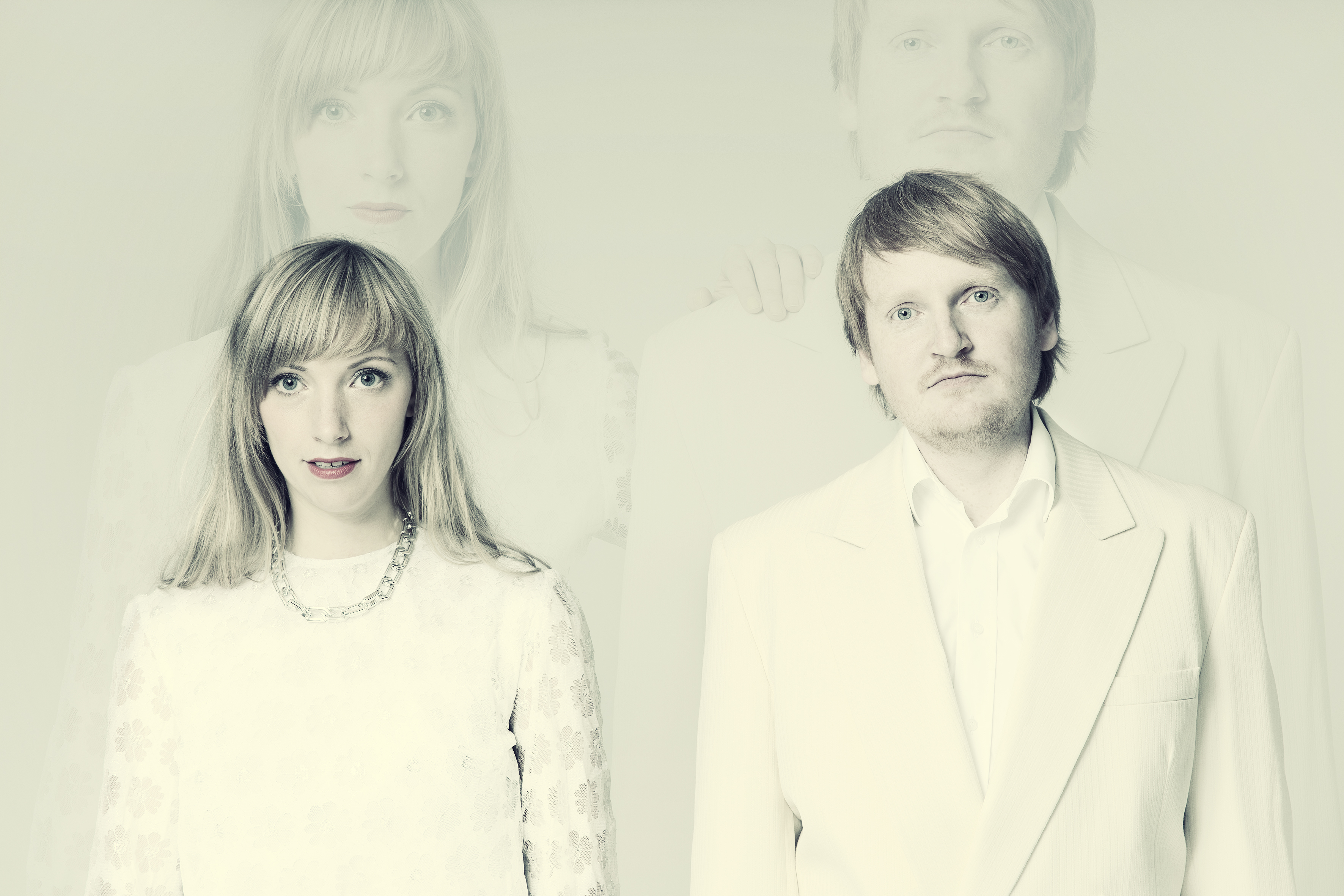 Ontz